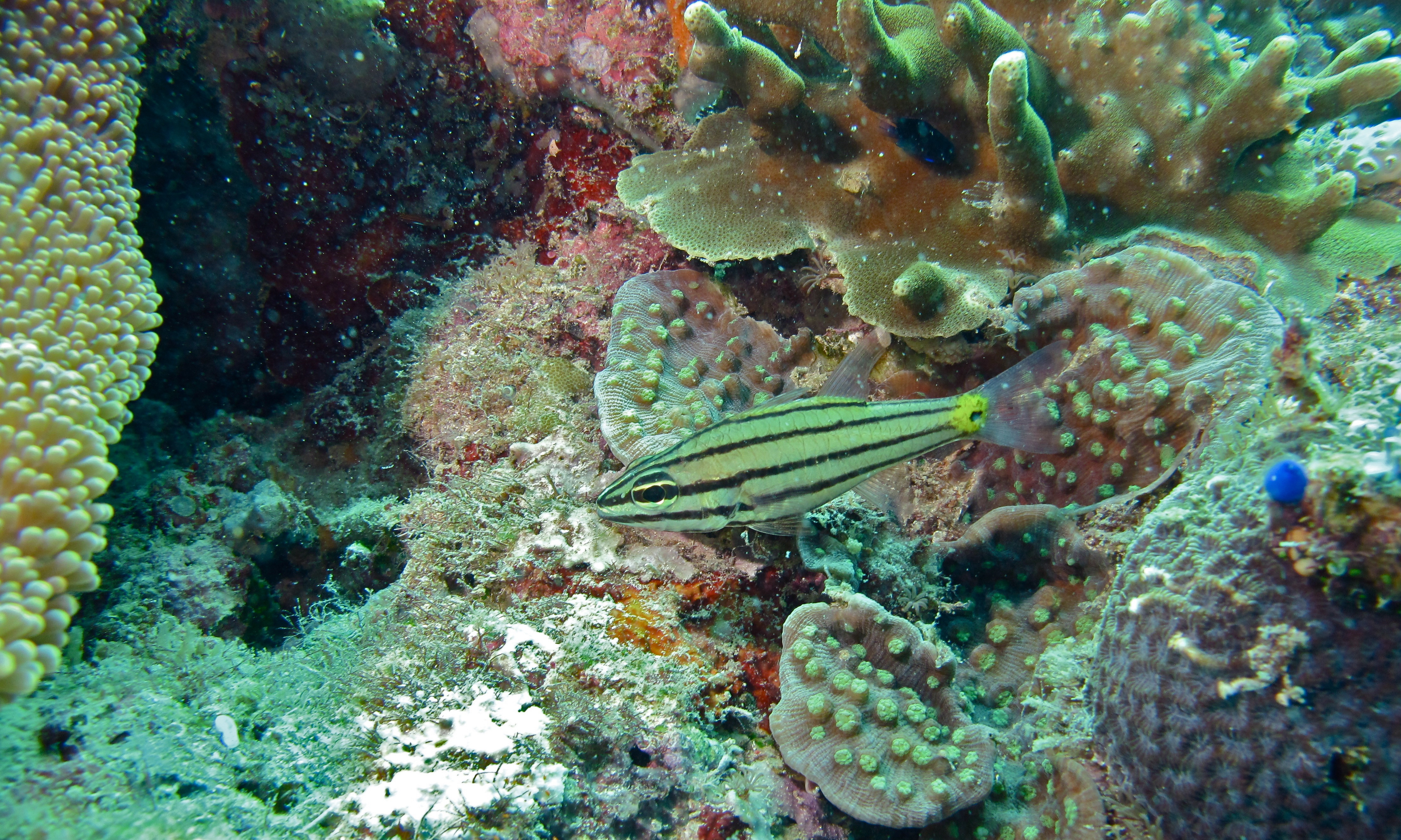 Panglima, Pulau Mabul, Sabah, MALAYSIA